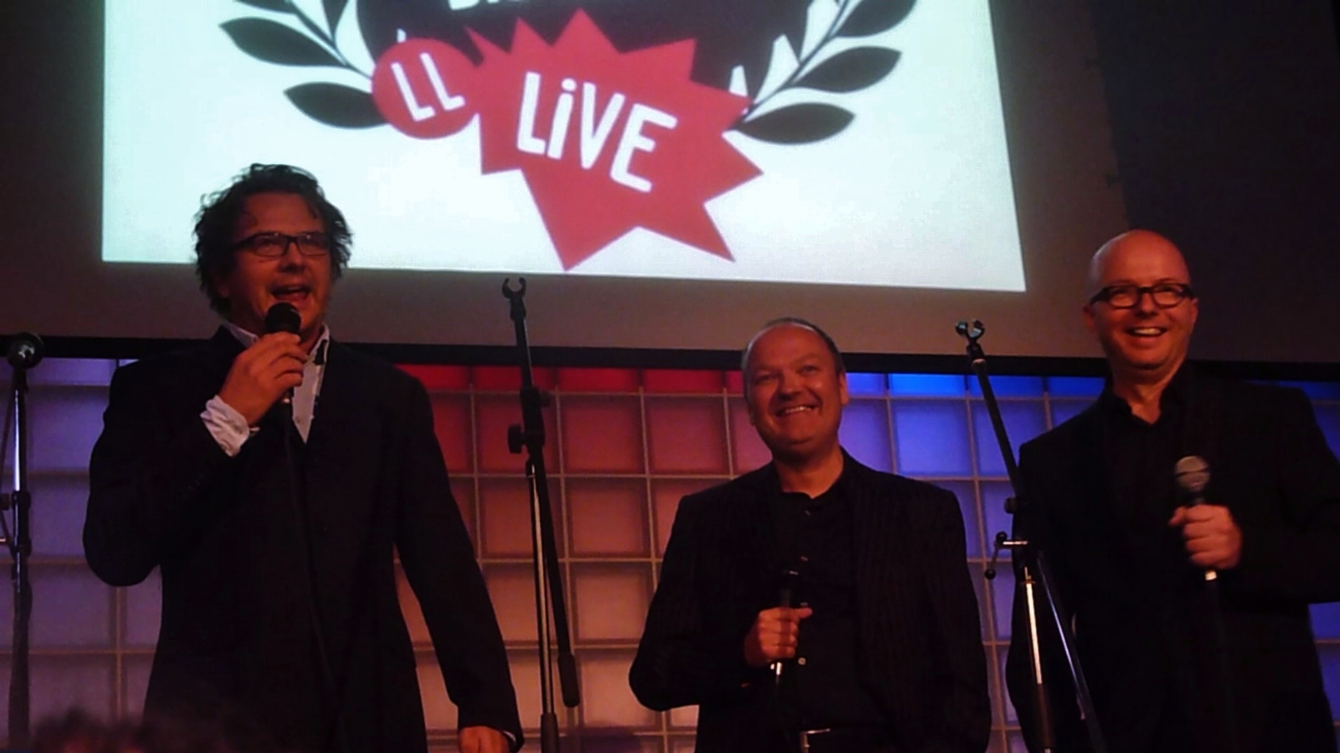 Die Sprecher der Hörspielserie "Die drei ???" während der Record Release Party zur Folge 150 im Edelfettwerk in Hamburg. Links im Bild Andreas Fröhlich als dritter Detektiv Bob Andrews, in der Mitte Jens Wawrczeck als zweiter Detektiv Peter Shaw, rechts Oliver Rohrbeck als erster Detektiv Justus Jonas.